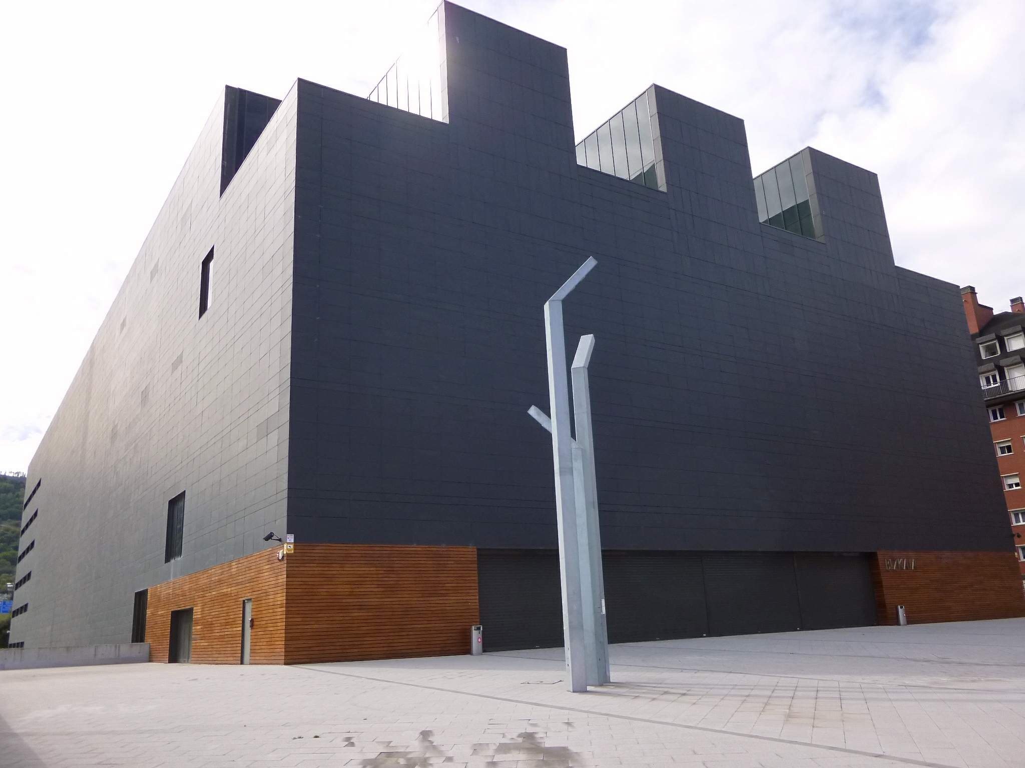 Frontón Bizkaia, en el barrio de Miribilla de Bilbao